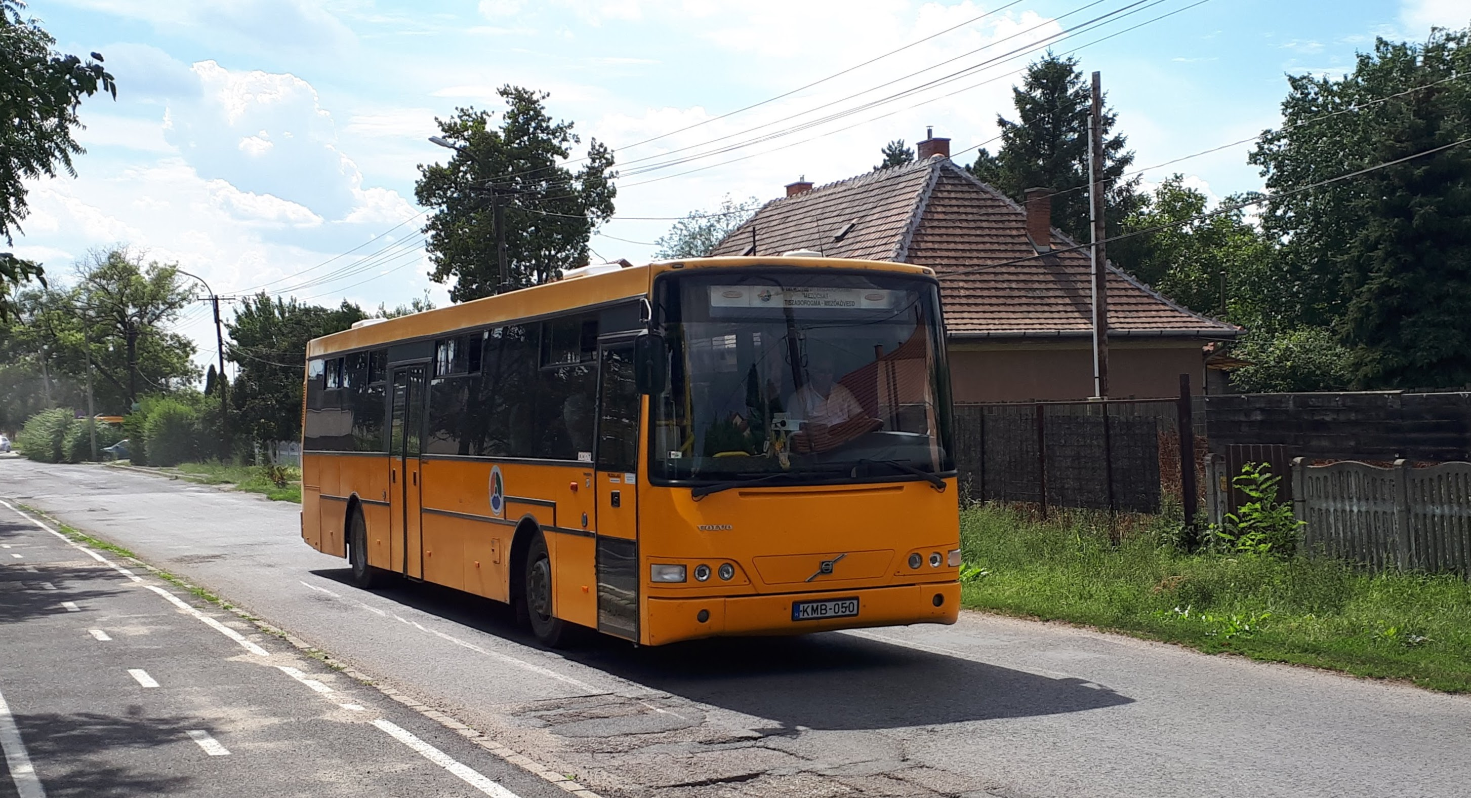 Az ÉMKK KMB-050 rendszámú Volvo Alfa Regio típusú busza Mezőkövesden, a 4010-es helyközi járaton.